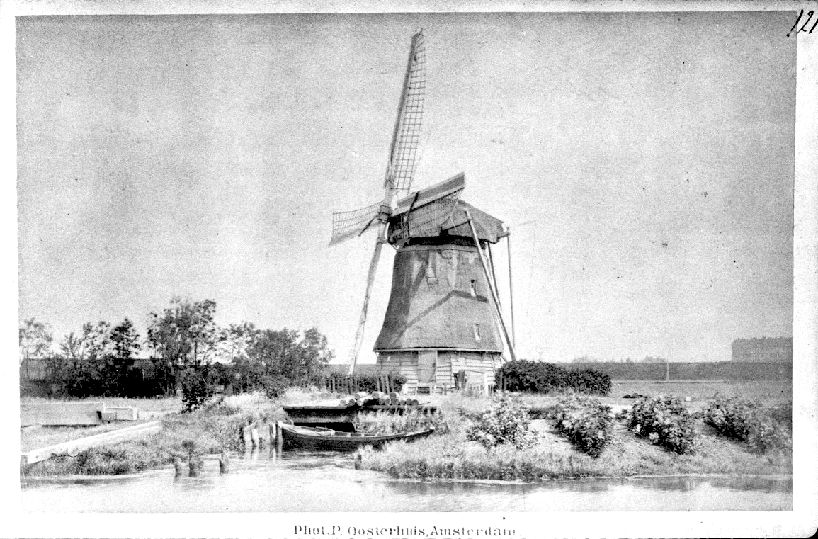 Molens: Overbrakerbinnenpolder - Benoorden de Haarlemmertrekvaart (afgebroken in 1884)